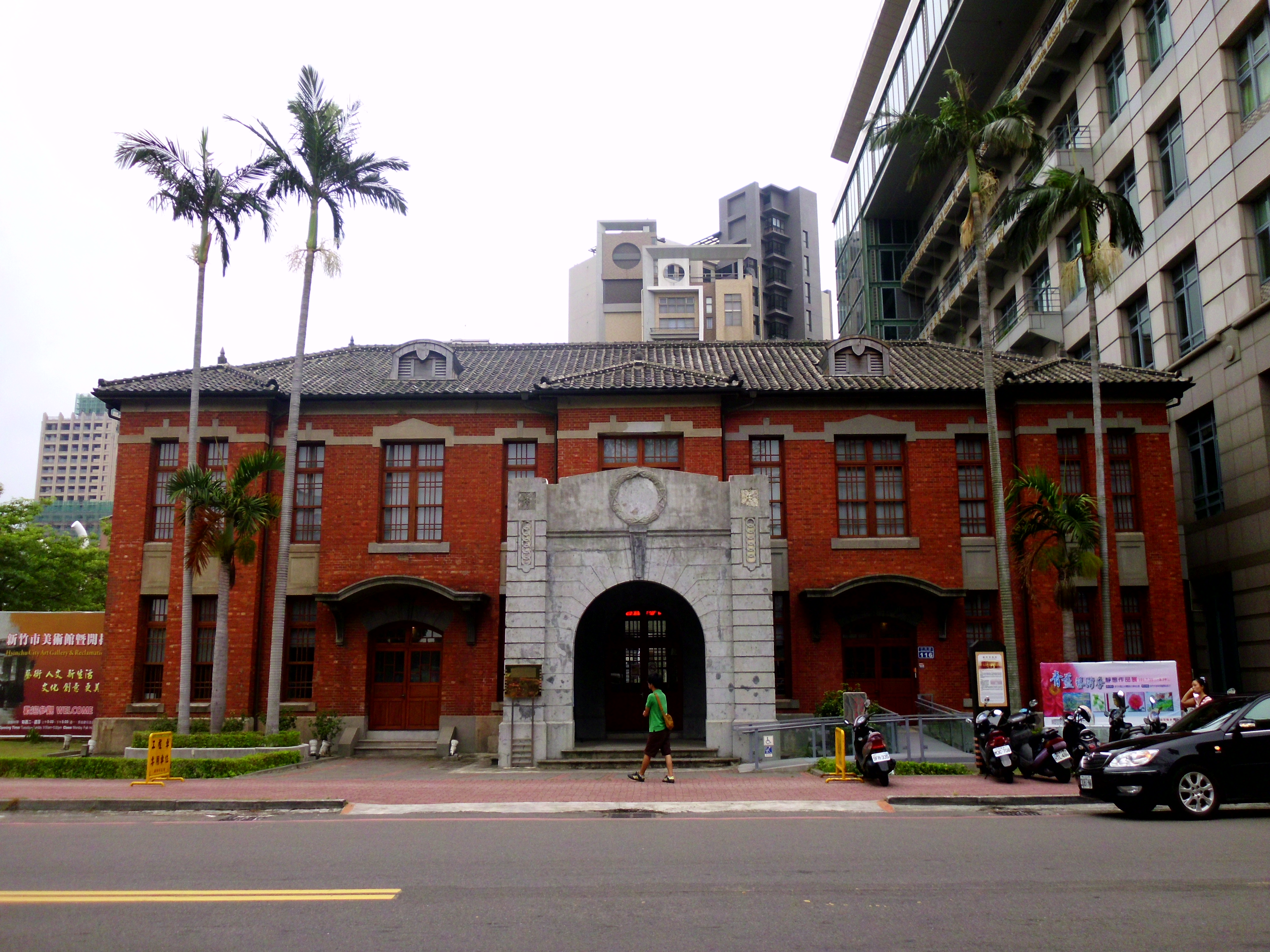 中文（台灣）: 新竹市役所，現為新竹市立美術館暨開拓館。